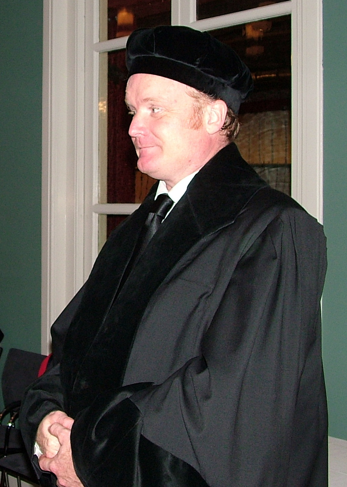 Marc van Oostendorp, Phonetiker. Universität von Leiden, Academiegebouw